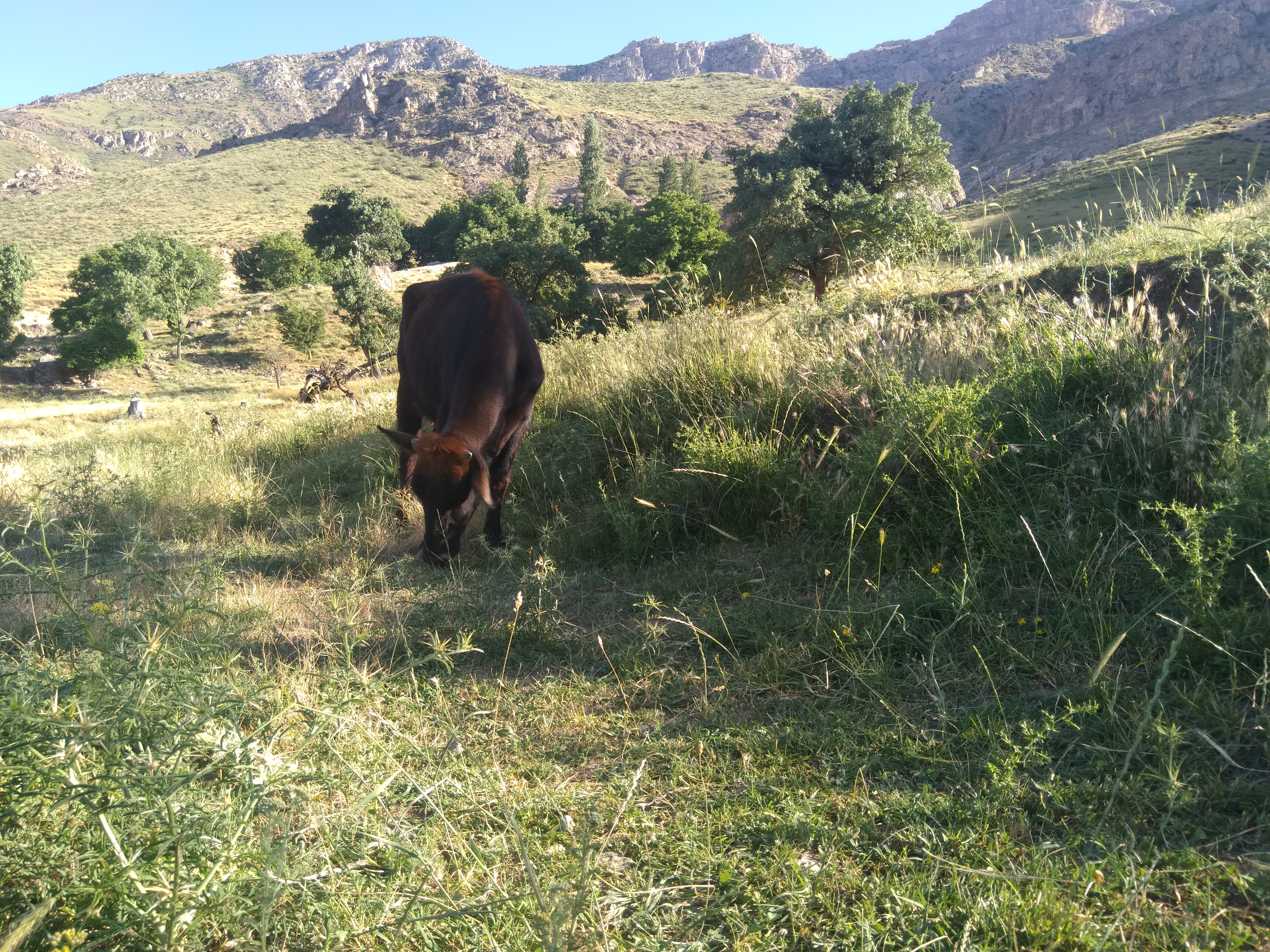 باغی در دامنه عرشه کوه در روستای خسرود که در زبان محلی به آن یخاری باغ (باغ بالا) می‌گویند.